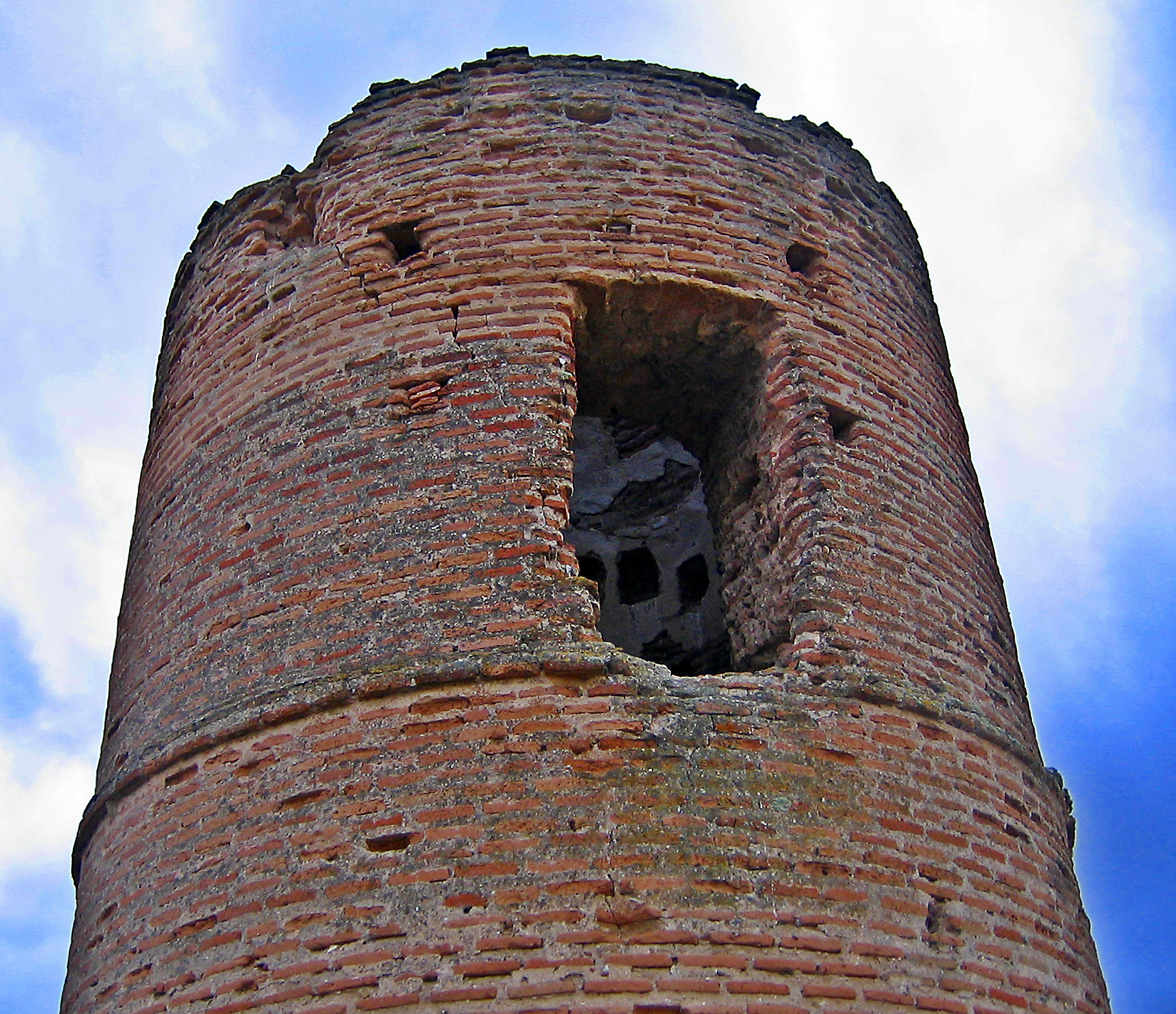 Ruinas del Castillo de Foncastín (pedanía de Rueda, Valladolid Spain)